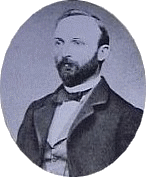 Wilhelm Riedel (1832 - 1876), Český malíř, krajinář.